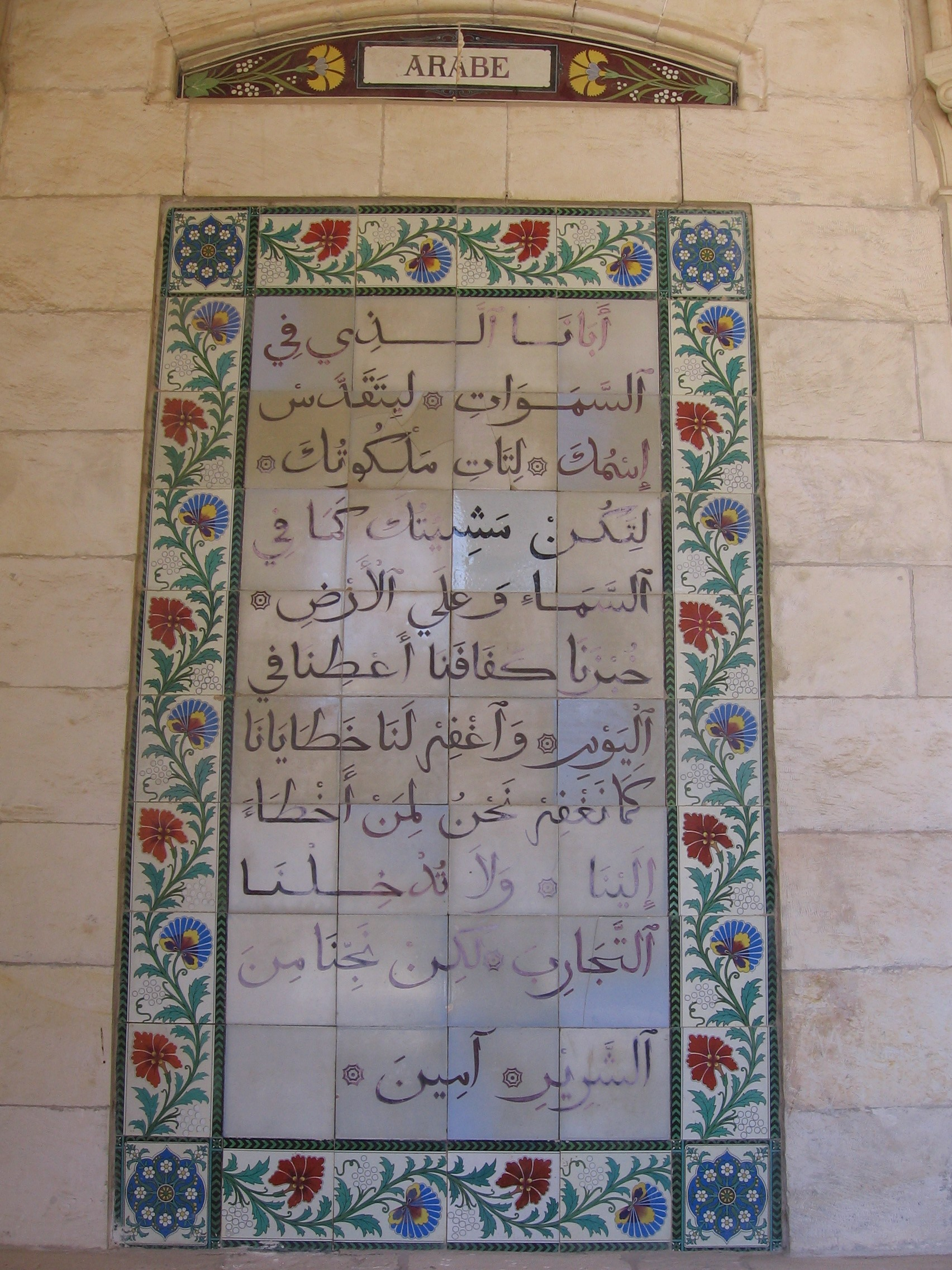 Chiesa del Padre Nostro, a Gerusalemme. Preghiera in arabo